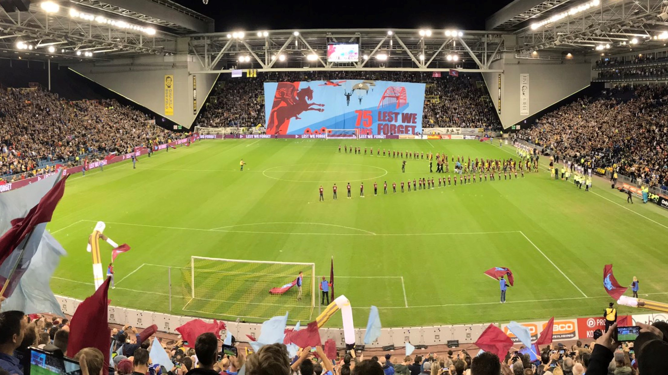 Airborne match Vitesse Arnhem